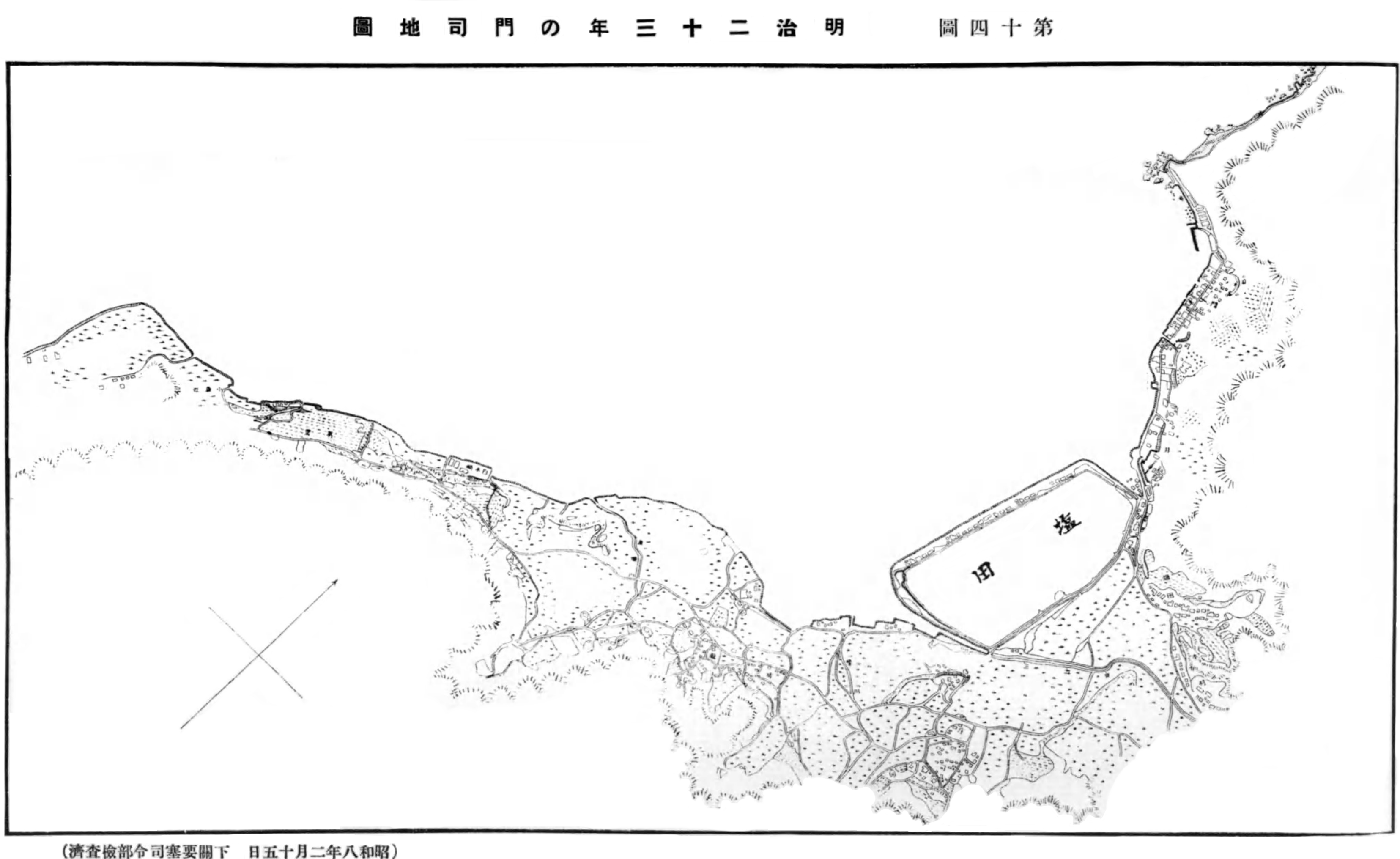 門司市編『門司市史』（昭和8年発行）所収の「第十四図 明治二十三年の門司地図」 当時の文字ヶ関村、現在の北九州市門司区の門司港地区から小森江地区にかけて。上部は関門海峡。